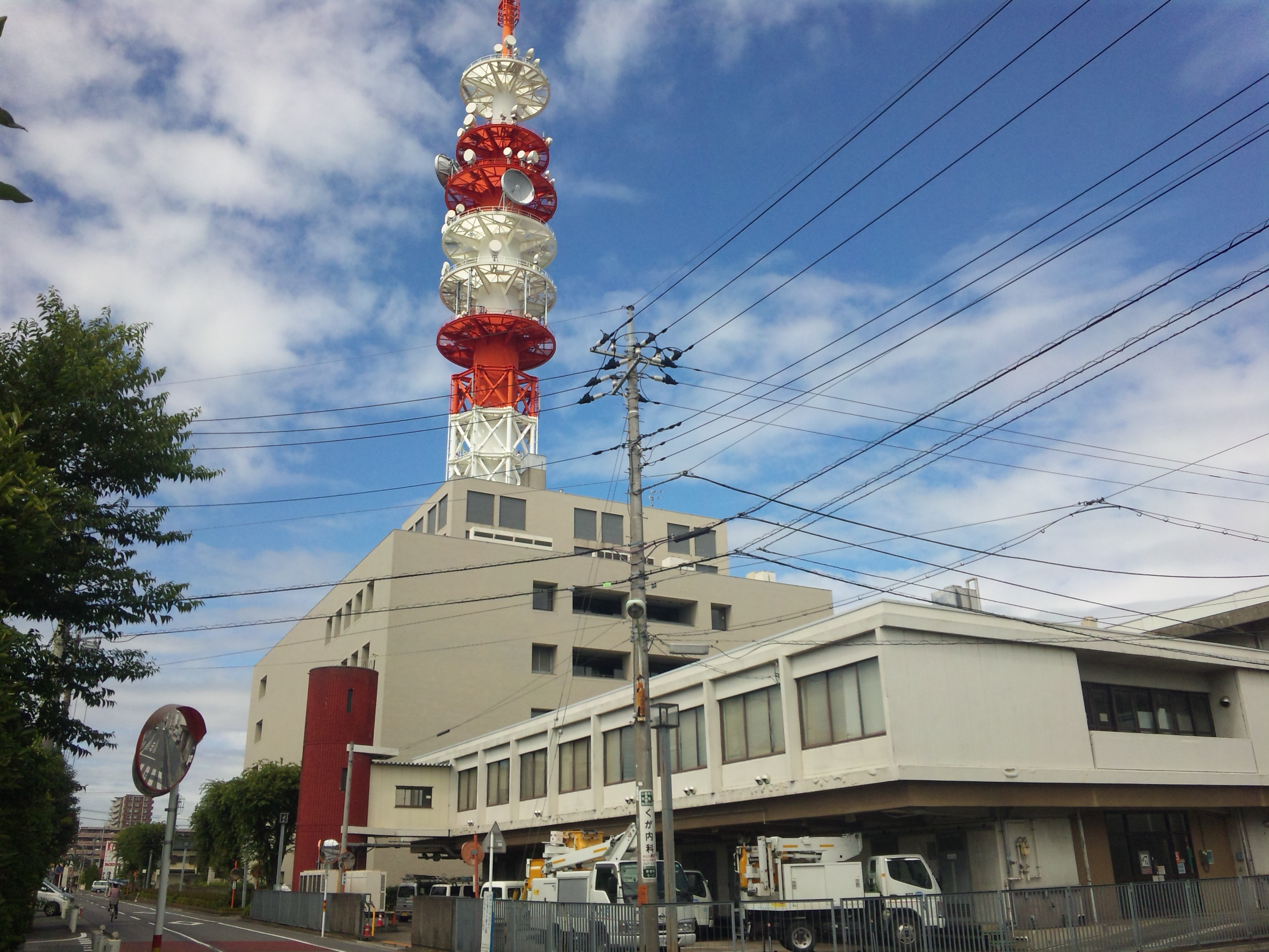 NTT東日本川越電話局